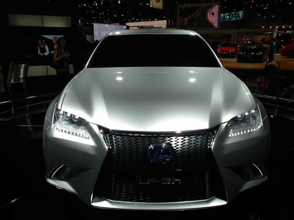 Lexus LF-Gh